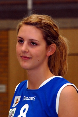 Photo der Basketballbundesligaspielerin Vera Gaspar